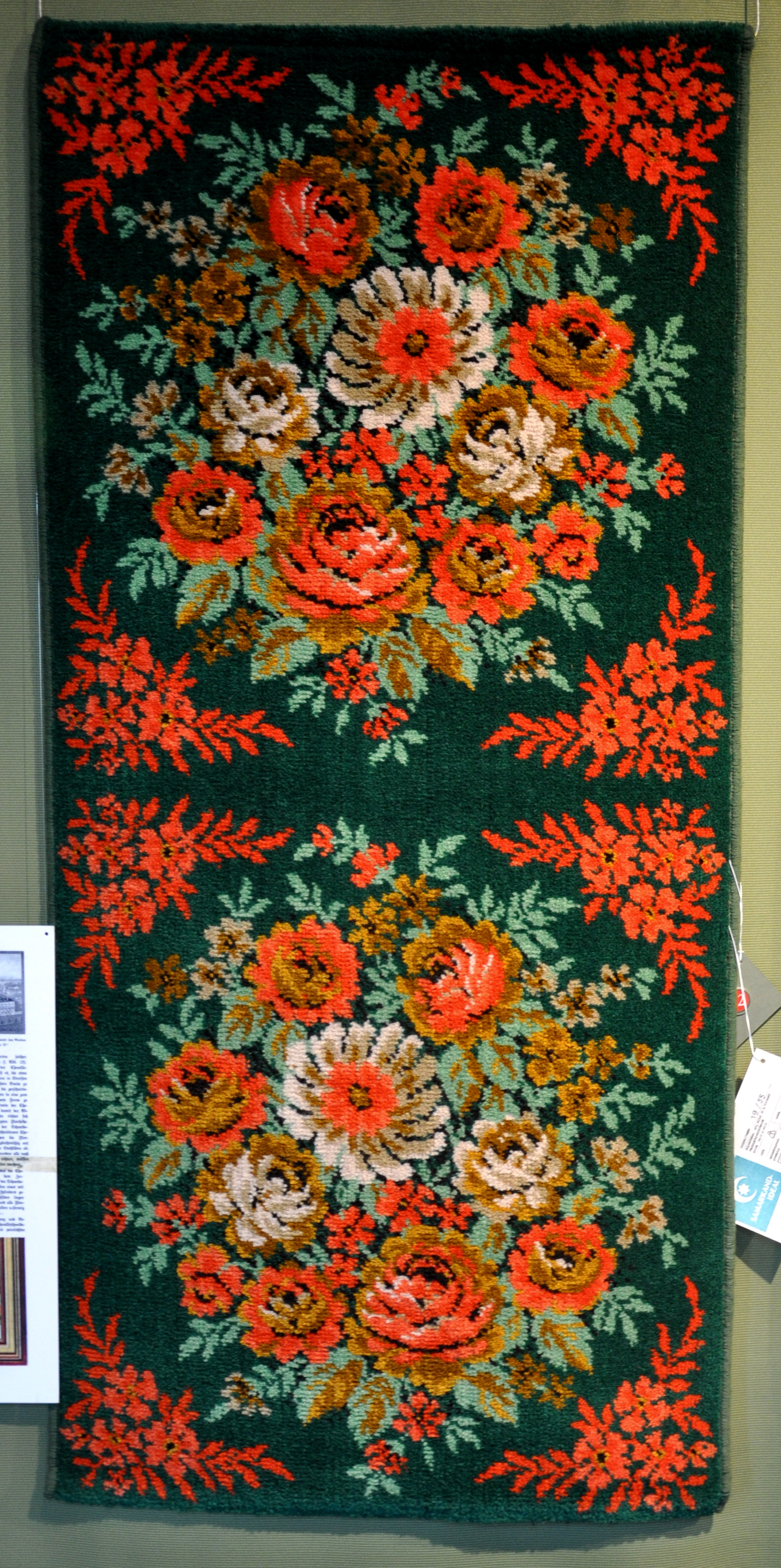 Oelsnitz/Vogtland, Teppich-Museum Schloss Voigtsberg Vorleger, VEB Halbmond-Teppiche Oelsnitz, 1970, Gripper-Axminster, Qualität: Samarkand-Ideal